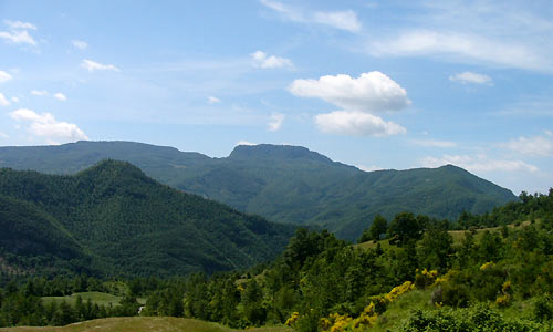 Bildbeschreibung: Nationalpark Foreste Casentinese